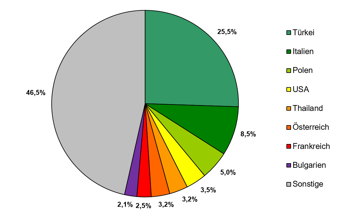 Verteilung ausländischer Mitbürger in Niedernberg